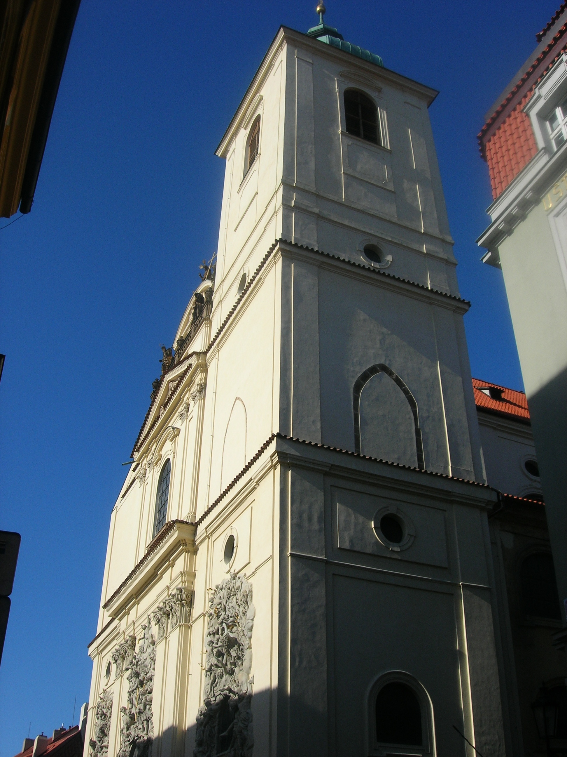 Kostel svatého Jakuba Většího in Prague, Czech Republic